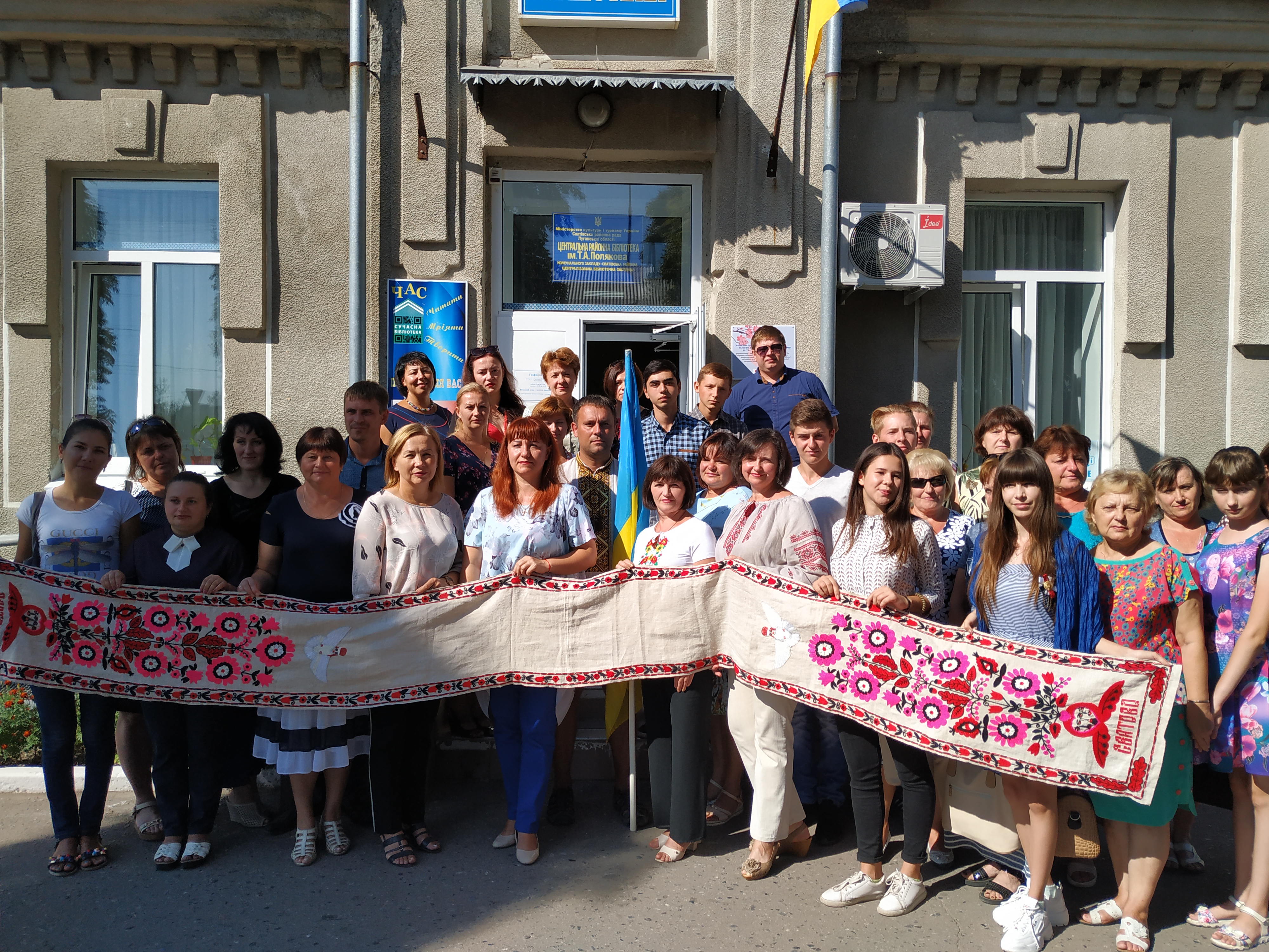 ТД 2-02. Сватове